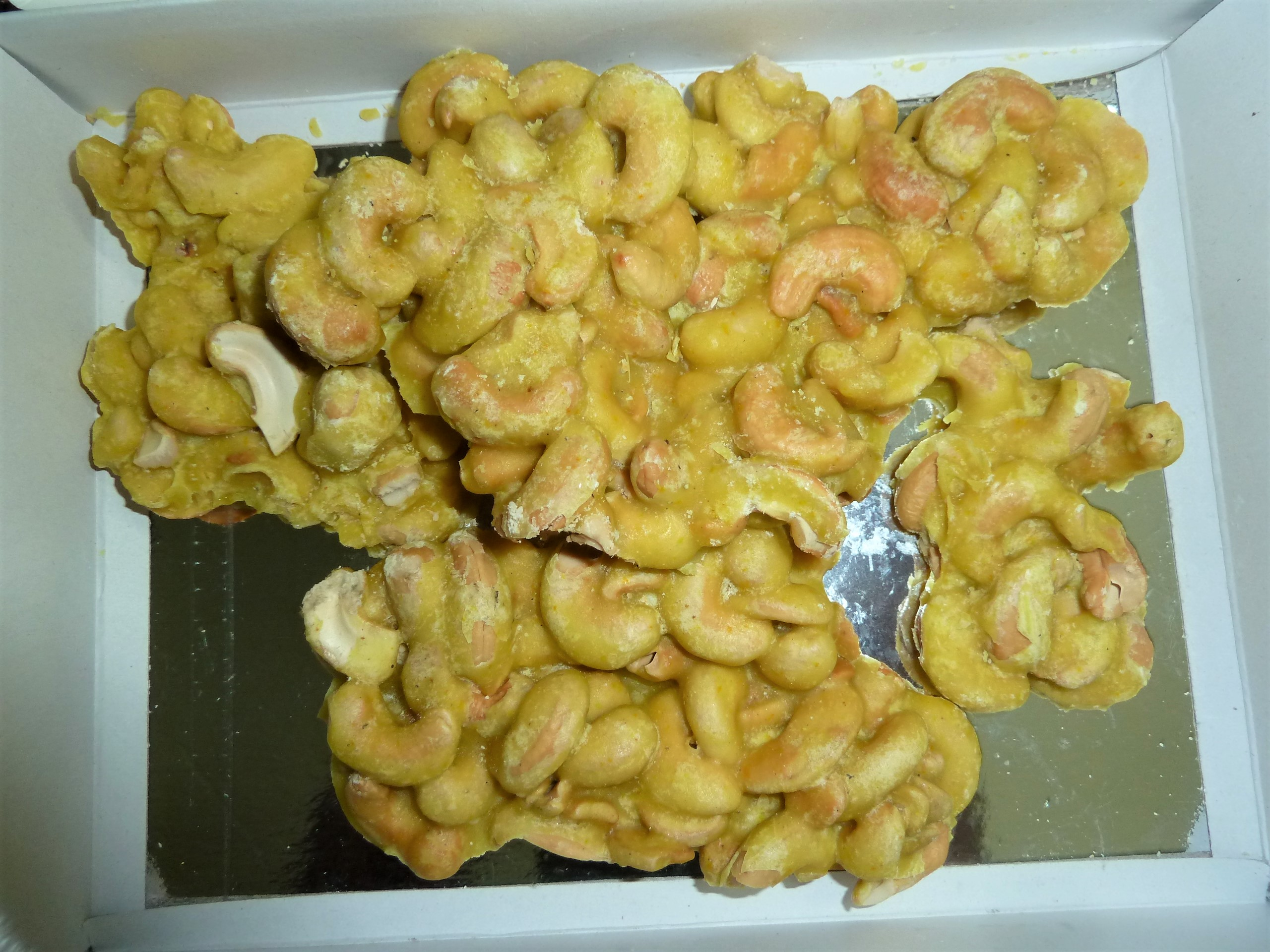 నెయ్యి, బెల్లంతో చేసిన జీడిపప్పు అచ్చు.